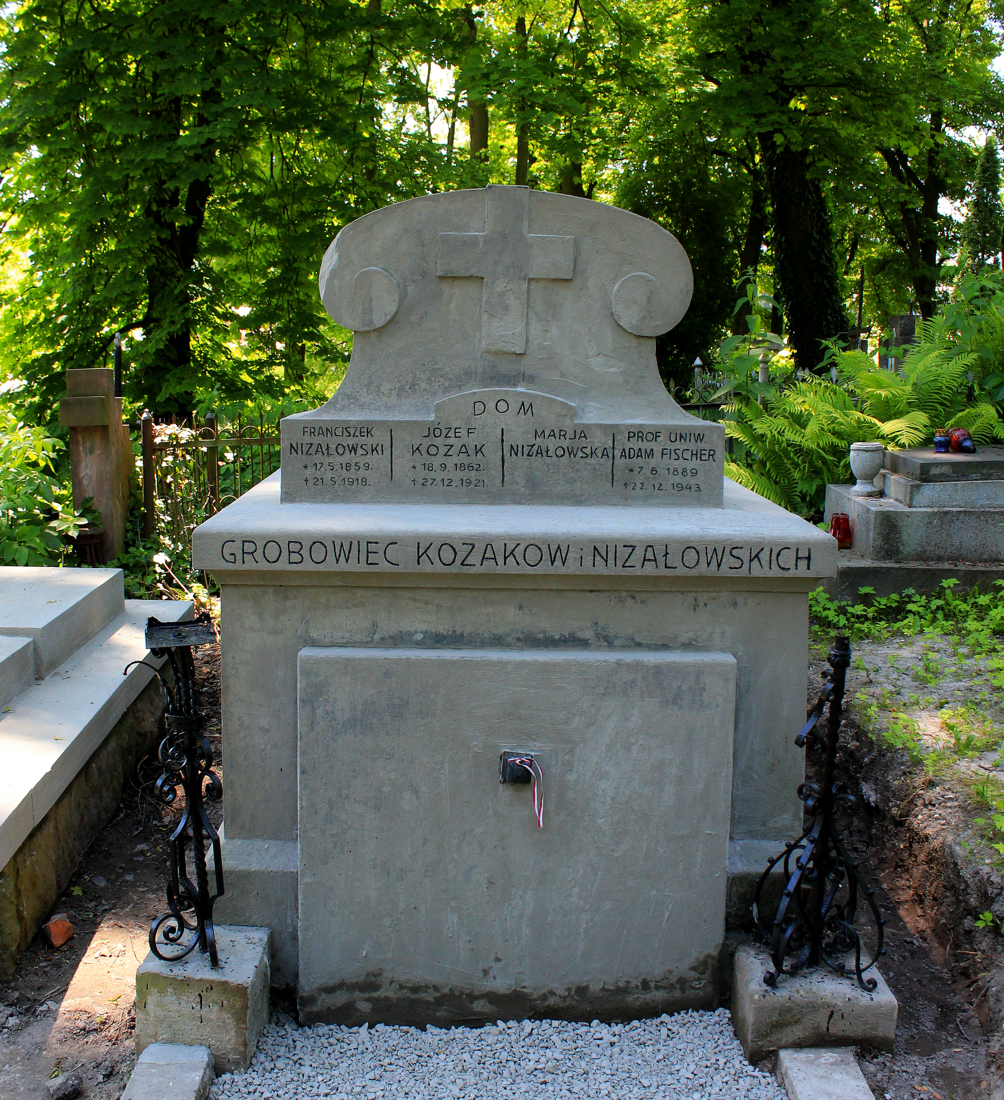 Lwów Cmentarz Łyczakowski - Grobowiec Kozaków i Nizałowskich w którym pochowano profesora Adama Fischera